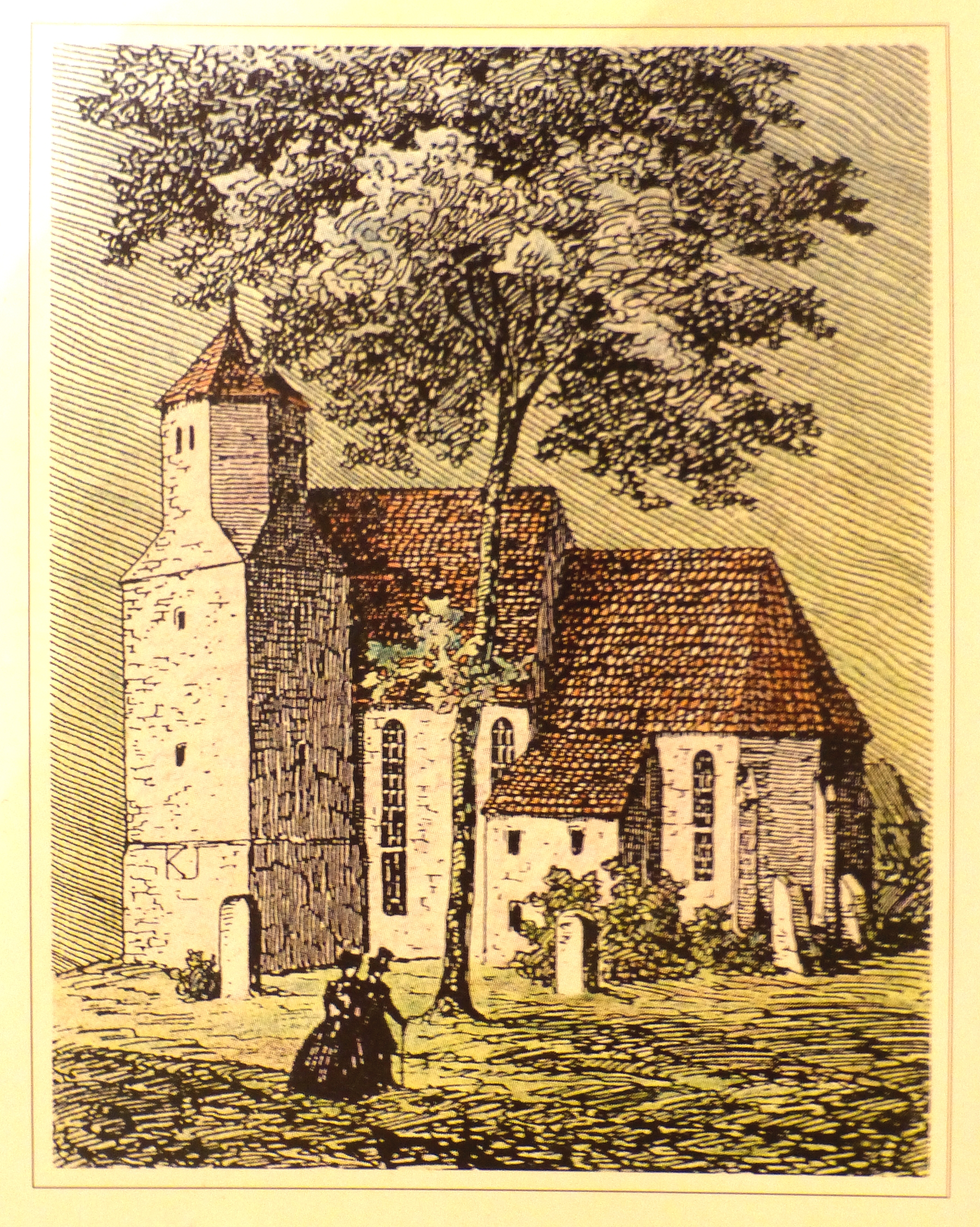 Stadtkirche Radeberg Ansicht um 1830